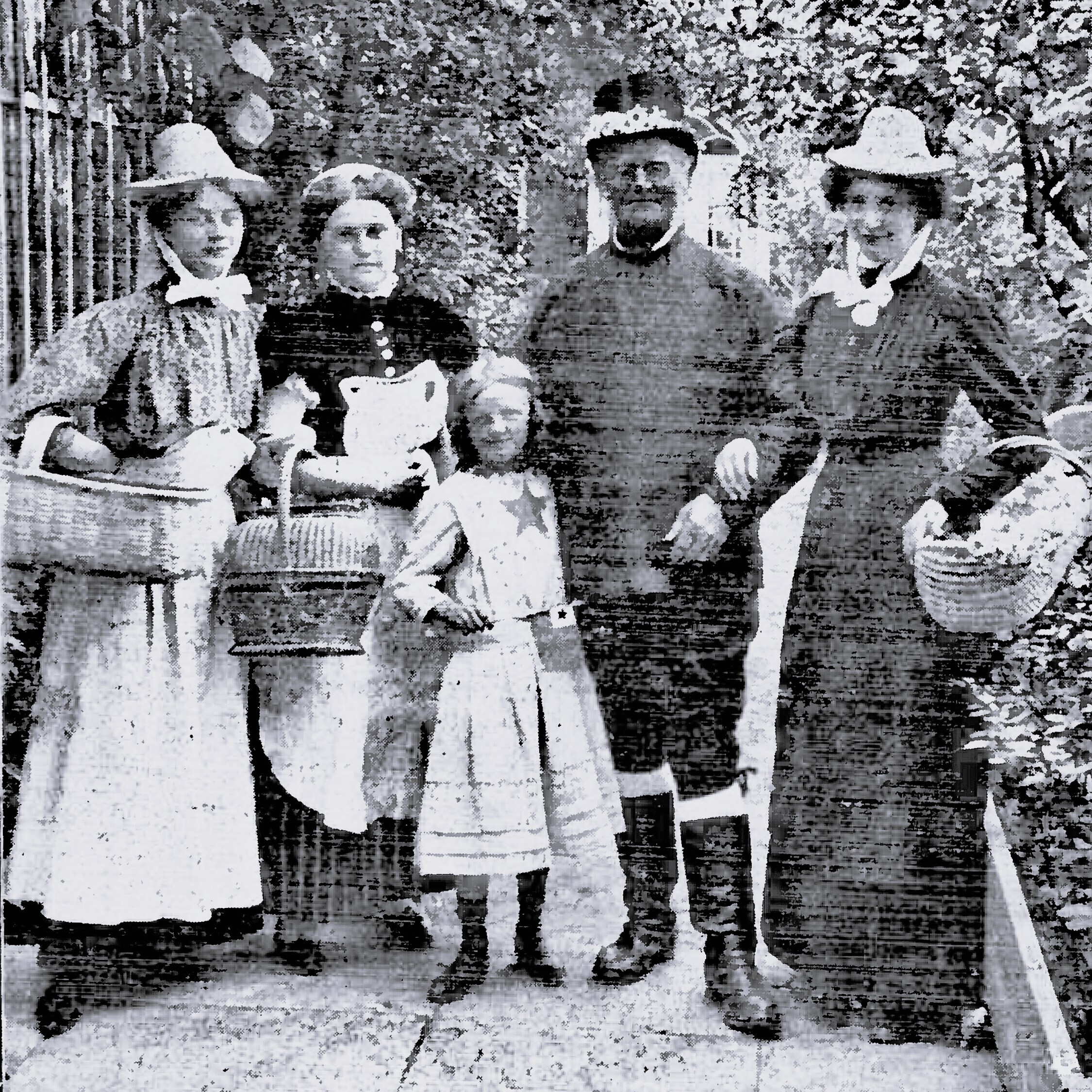 Die Botschaft des Fotos lautet: „Das junge Esperanto ist im Zerntrum Deutschlands angekommen“. Eingerahmt von verschiedenen älteren dt. Landestrachtenträgern (dt. Dialekte) steht, symbolisch ein weißes Kleid mit grünem Esperantostern (wie die Esperantofahne) tragend, ein junges Mädchen. Aufgenommen wurde das Bild im damaligem Schabbelhaus.